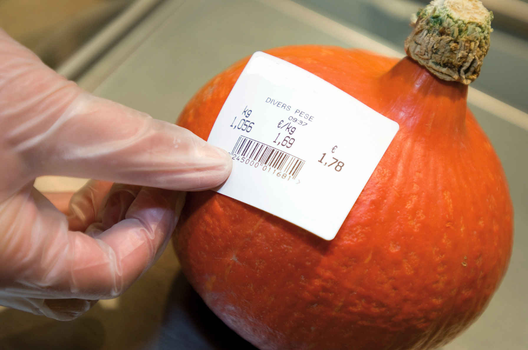 Etiquette apposée sur un légume